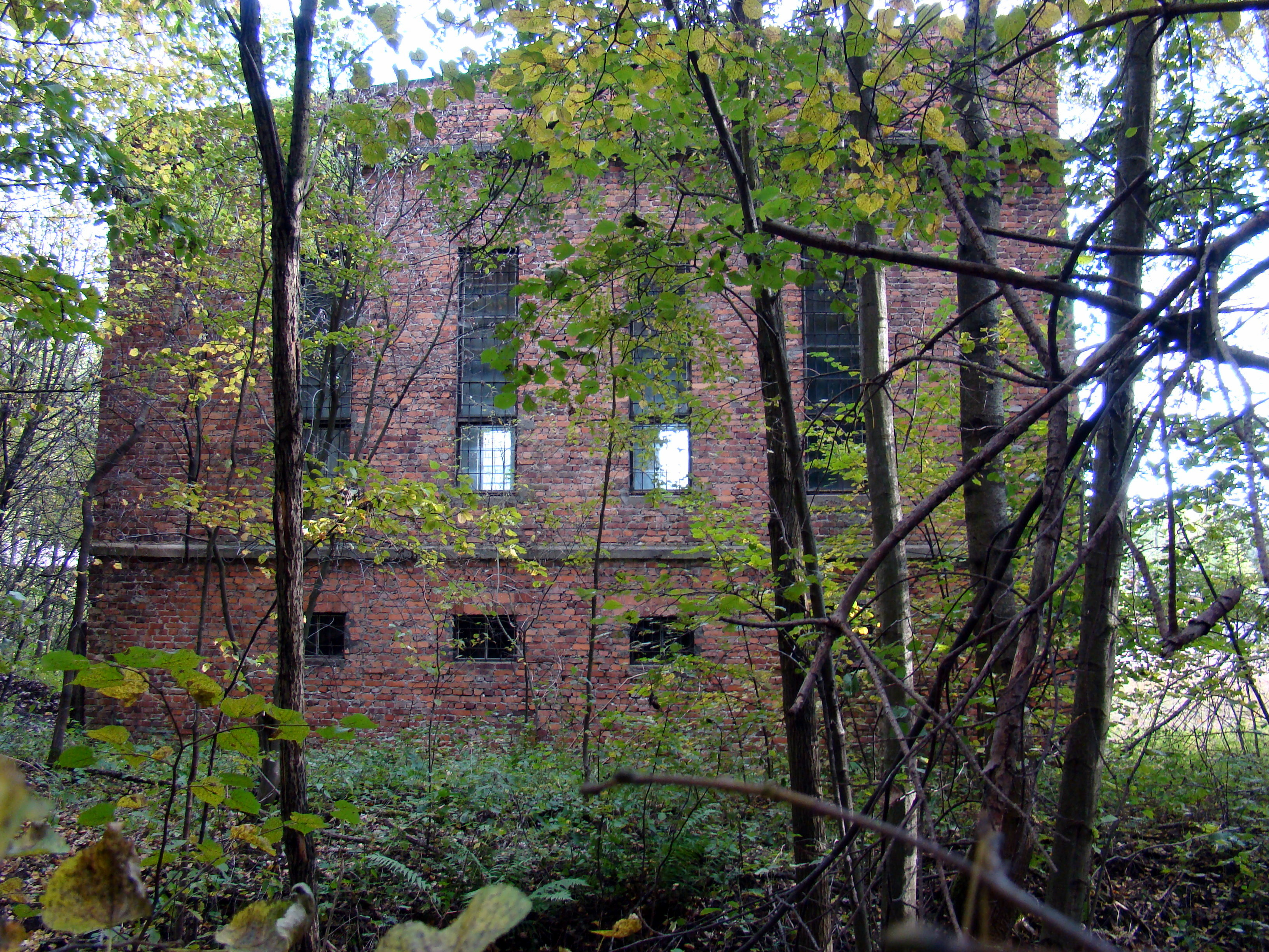 Budynek nieczynnej kopalni rud żelaza "Dębowiec", Dębowiec, gmina Poczesna